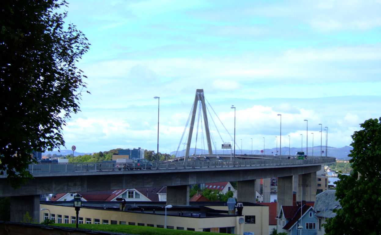 Bybrua i Stavanger